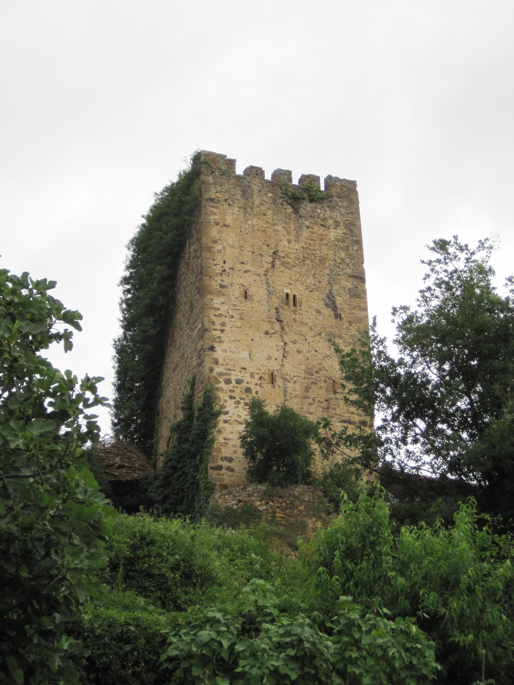 Torre de Mogrovejo, en Cantabria (España).